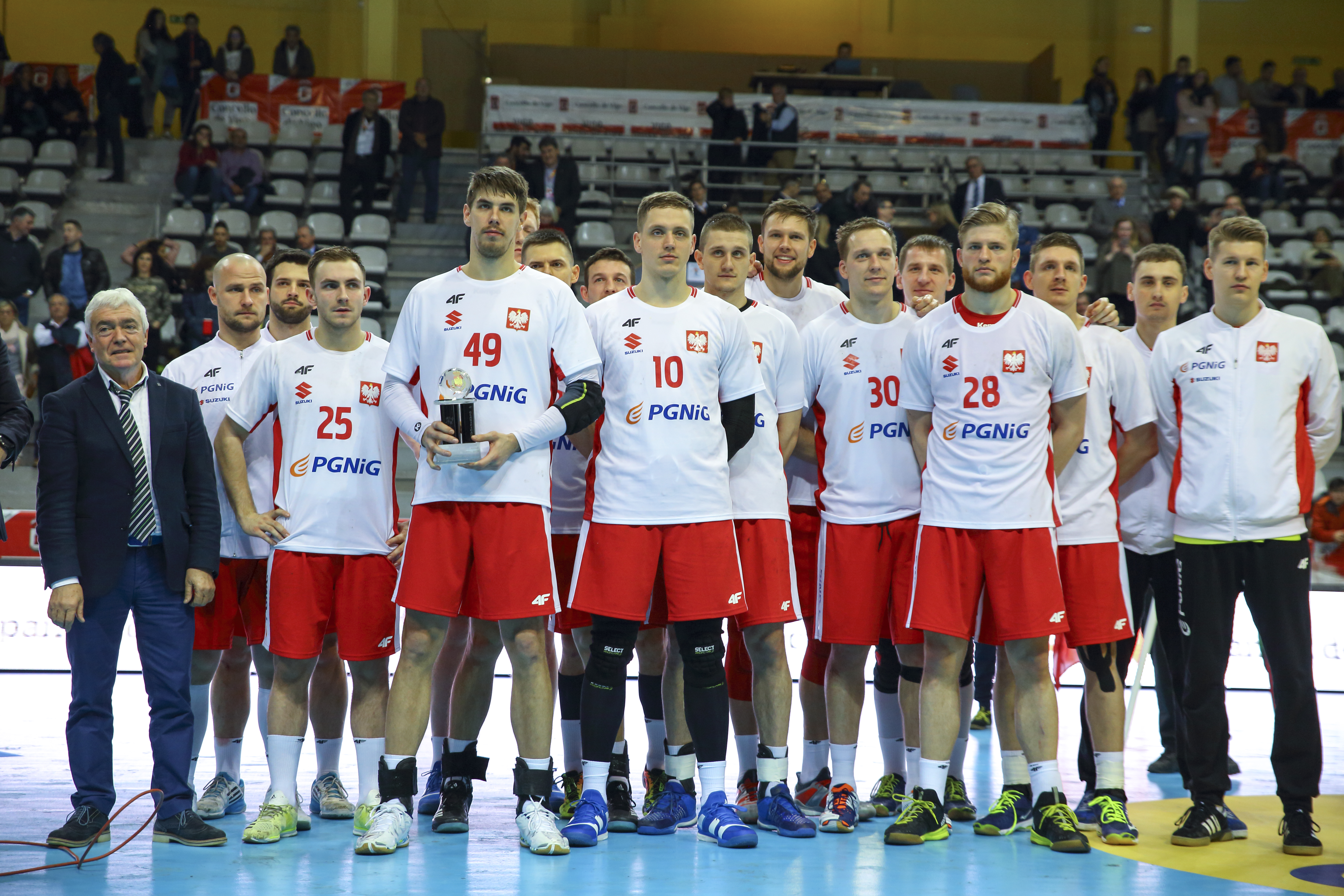 XLIII Torneo Internacional de España, disputado en Pontevedra y Vigo, para el último preparatorio de cara al Europeo, con la convocatorio ya definitiva.